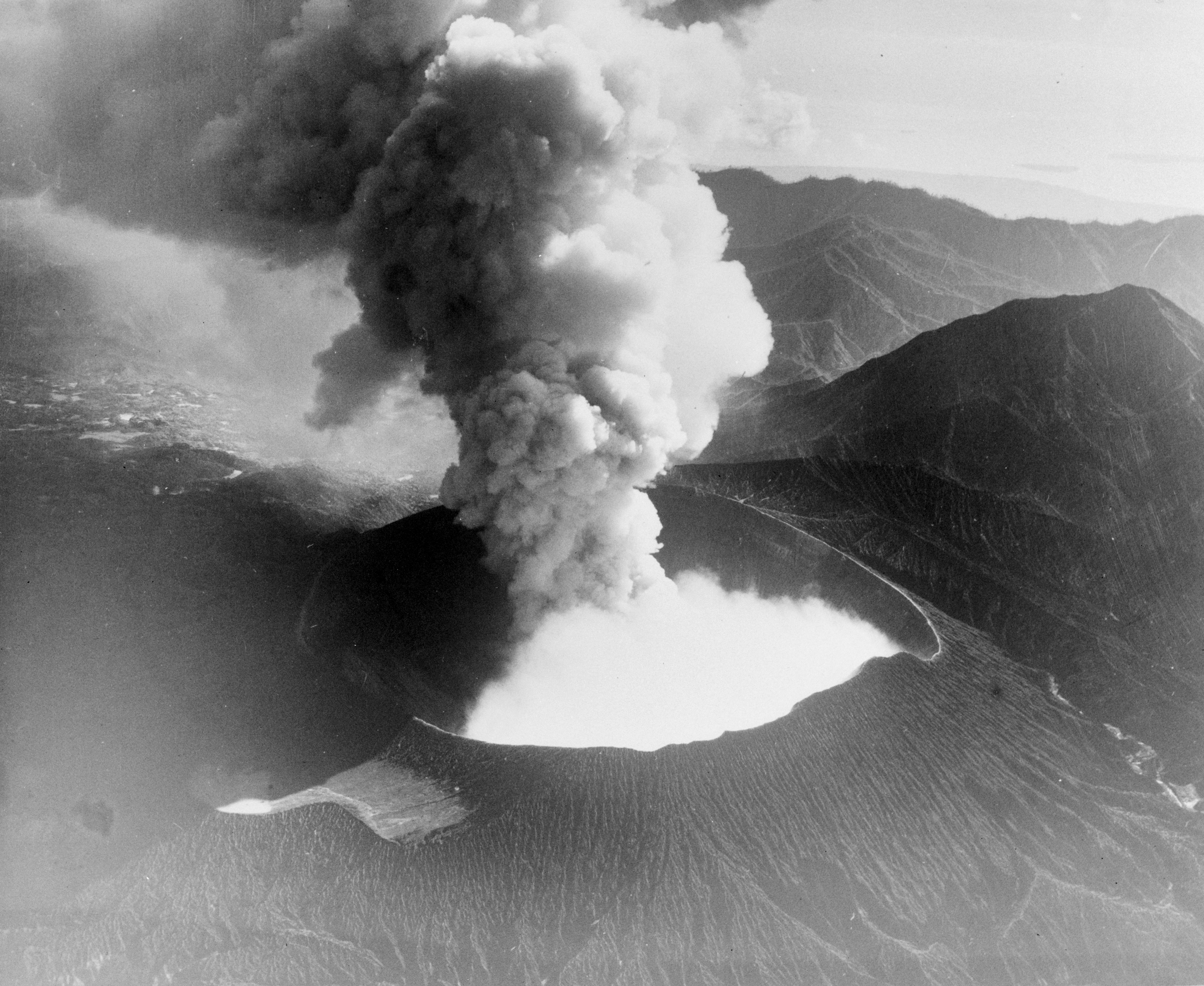 Vulkaan bij Halmaheira